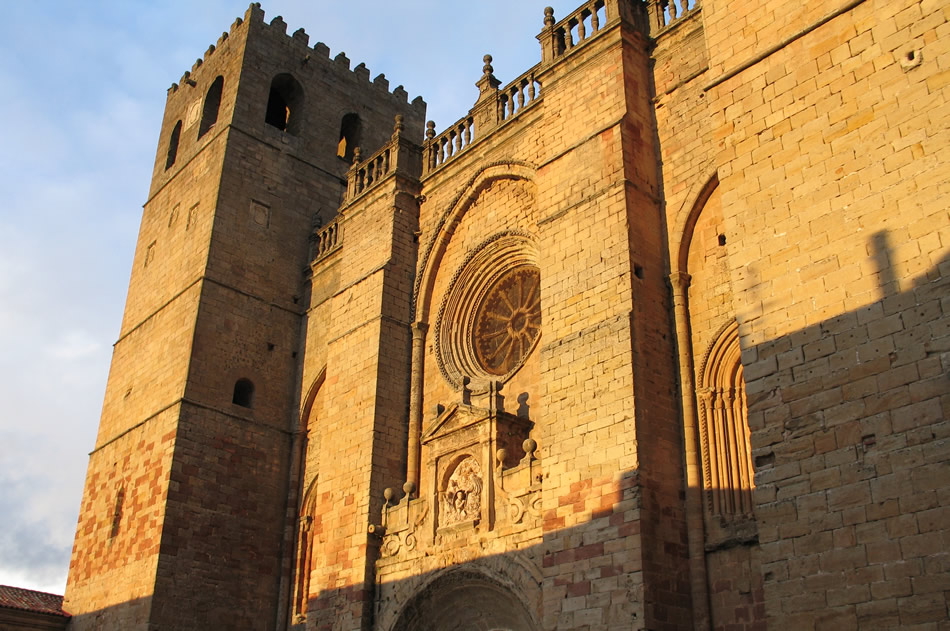 Catedral de Sigüenza. Sigüenza (Guadalajara, España)